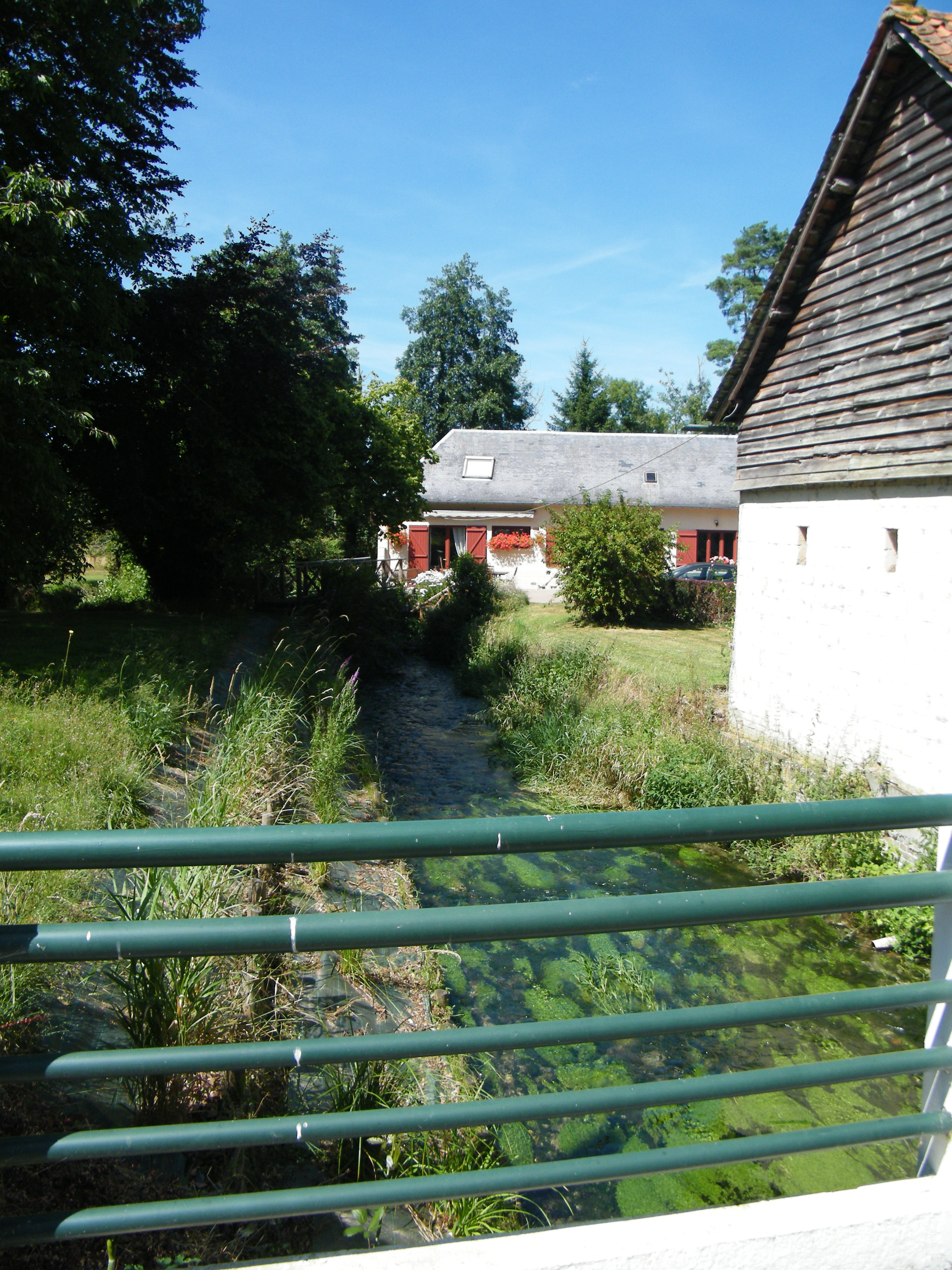 Machiel, Somme, Fr, La Maye, vue du pont, amont.